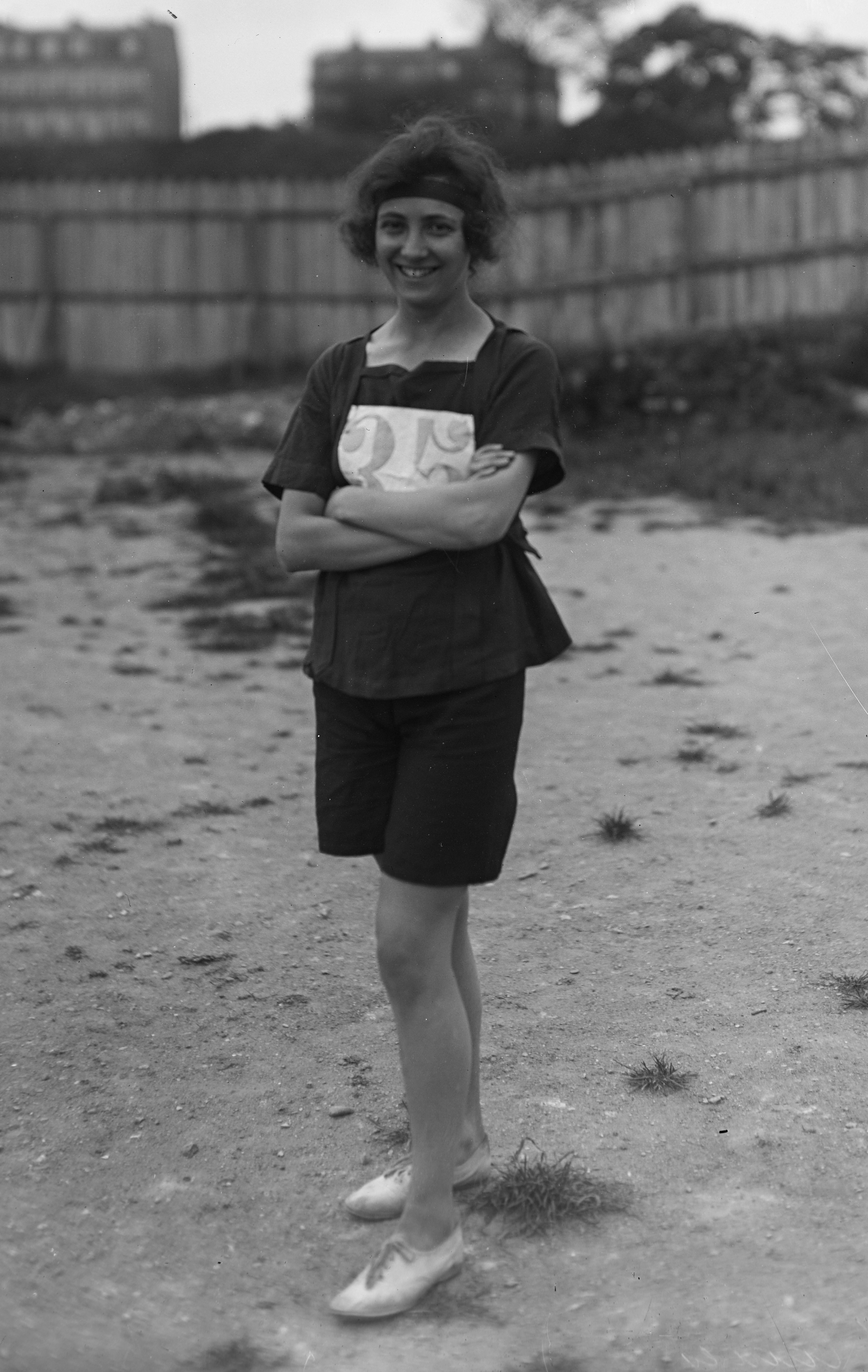 Portrait de la coureuse de demi-fond Lucie Cadiès [6/6/20, stade Elisabeth].